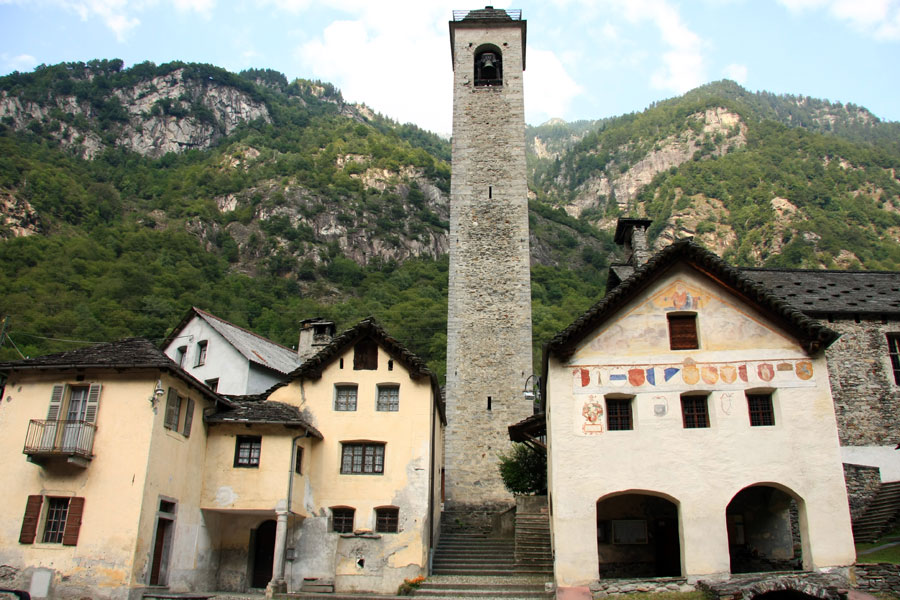 Veduta di Prato-Sornico, sede del comune di Lavizzara, TI-CH